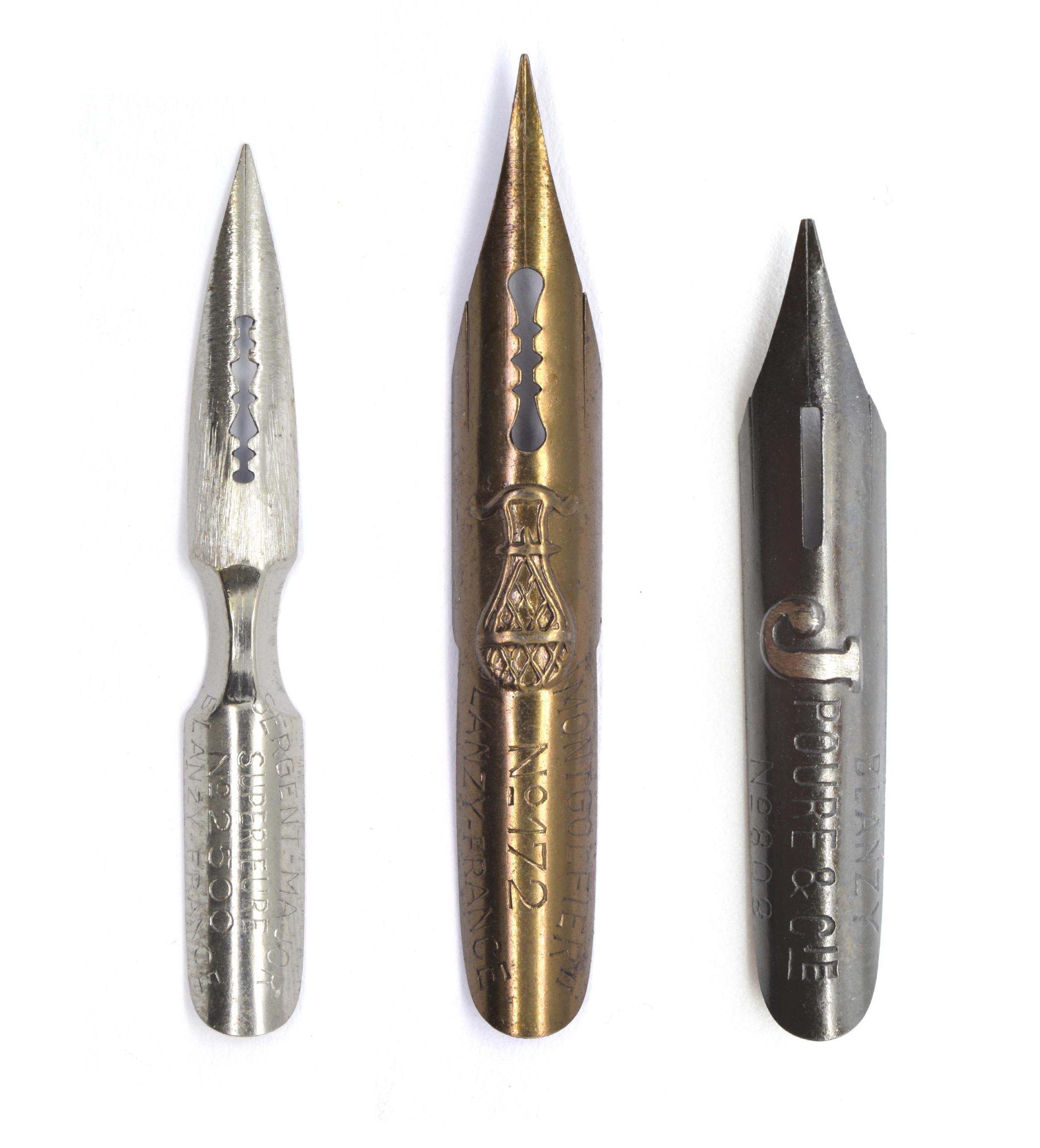 Tres plomes metàl·liques clàssiques: Sergent-Major, Montgolfier (ploma Globus), ploma J